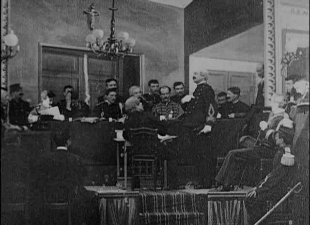 Méliès, L'affaire Dreyfus, Le Conseil de Guerre en seance à Rennes (Star Film 214-215, 1899)